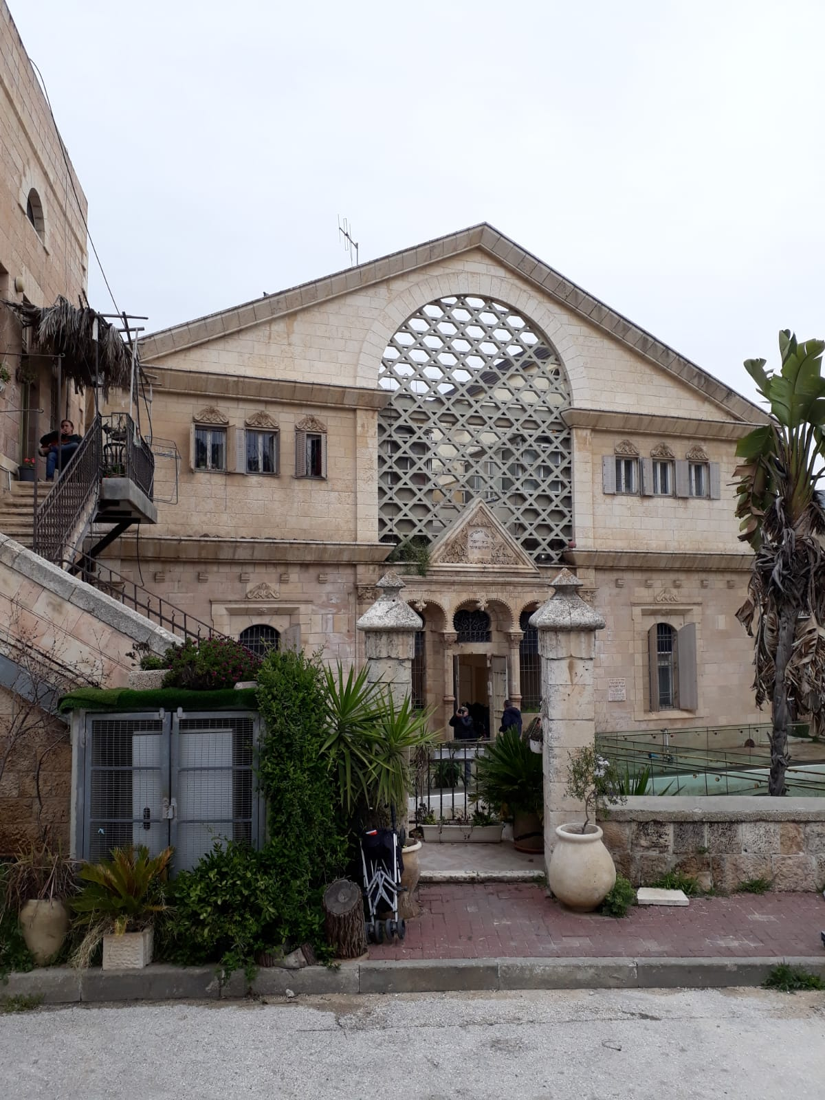 בית הדסה, חברון, מרץ 2019